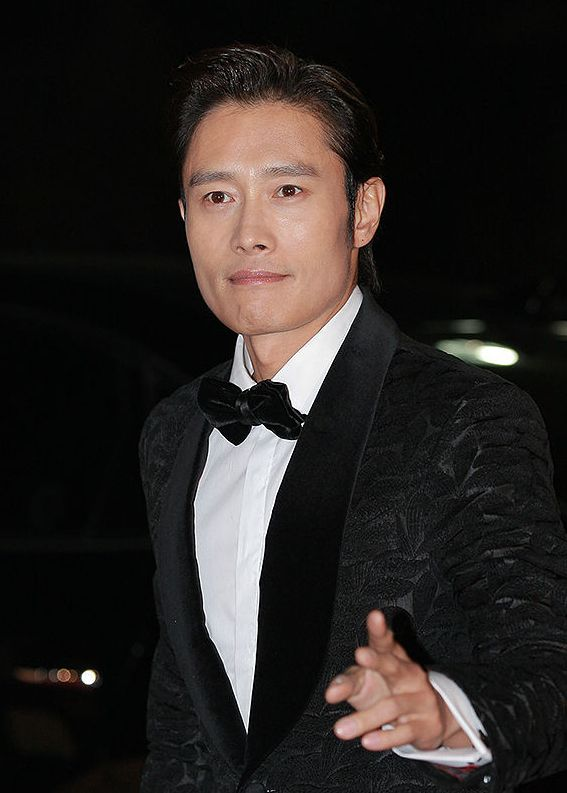 제34회 청룡영화상